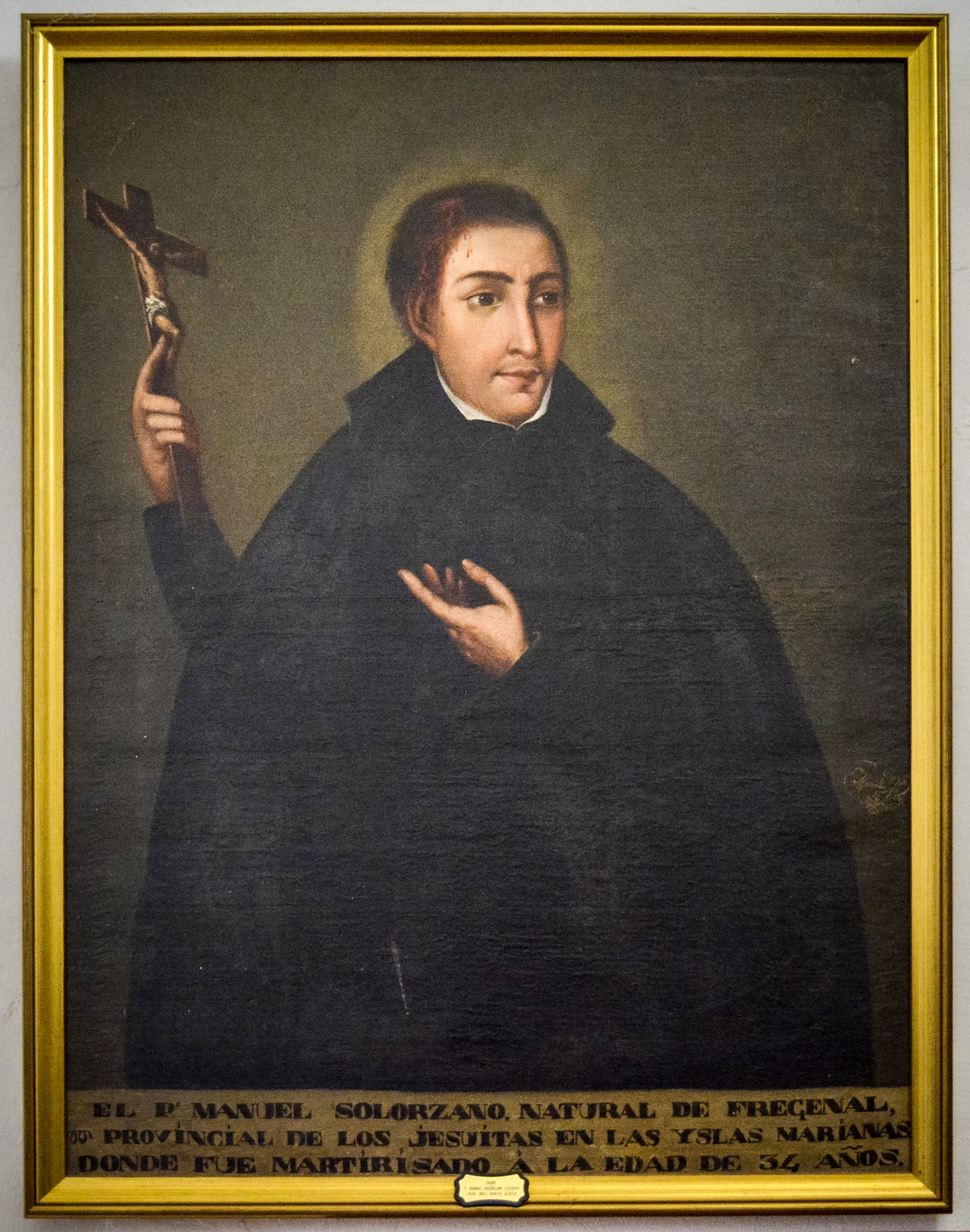 Retrato imaginario de Manuel de Solórzano, Manuel Miguel de Miranda (1852). Óleo sobre lienzo. Hospedería del santuario de la Virgen de los Remedios, Fregenal de la Sierra (Badajoz).